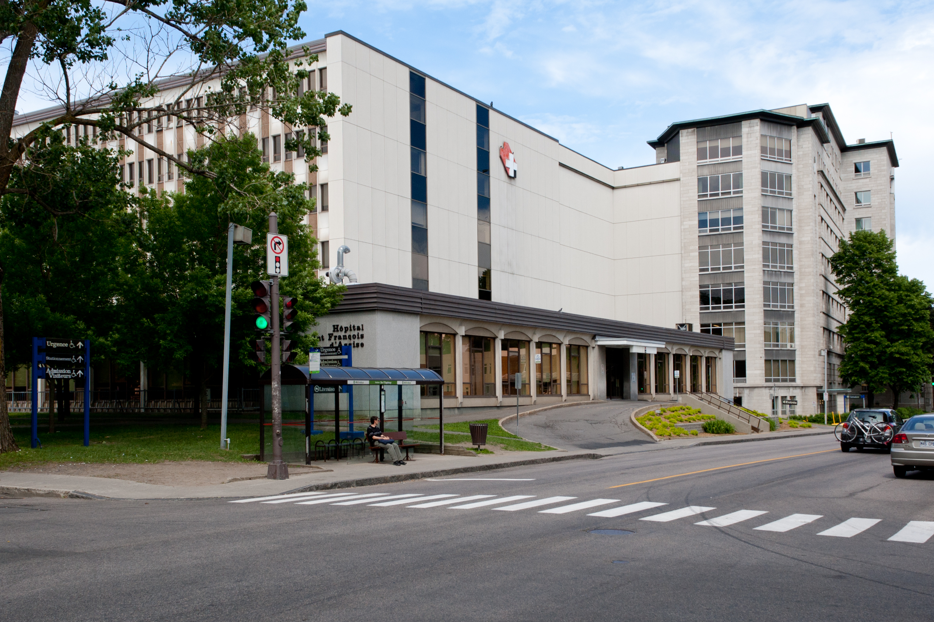 Hôpital situé sur la 1re avenue à Limoilou